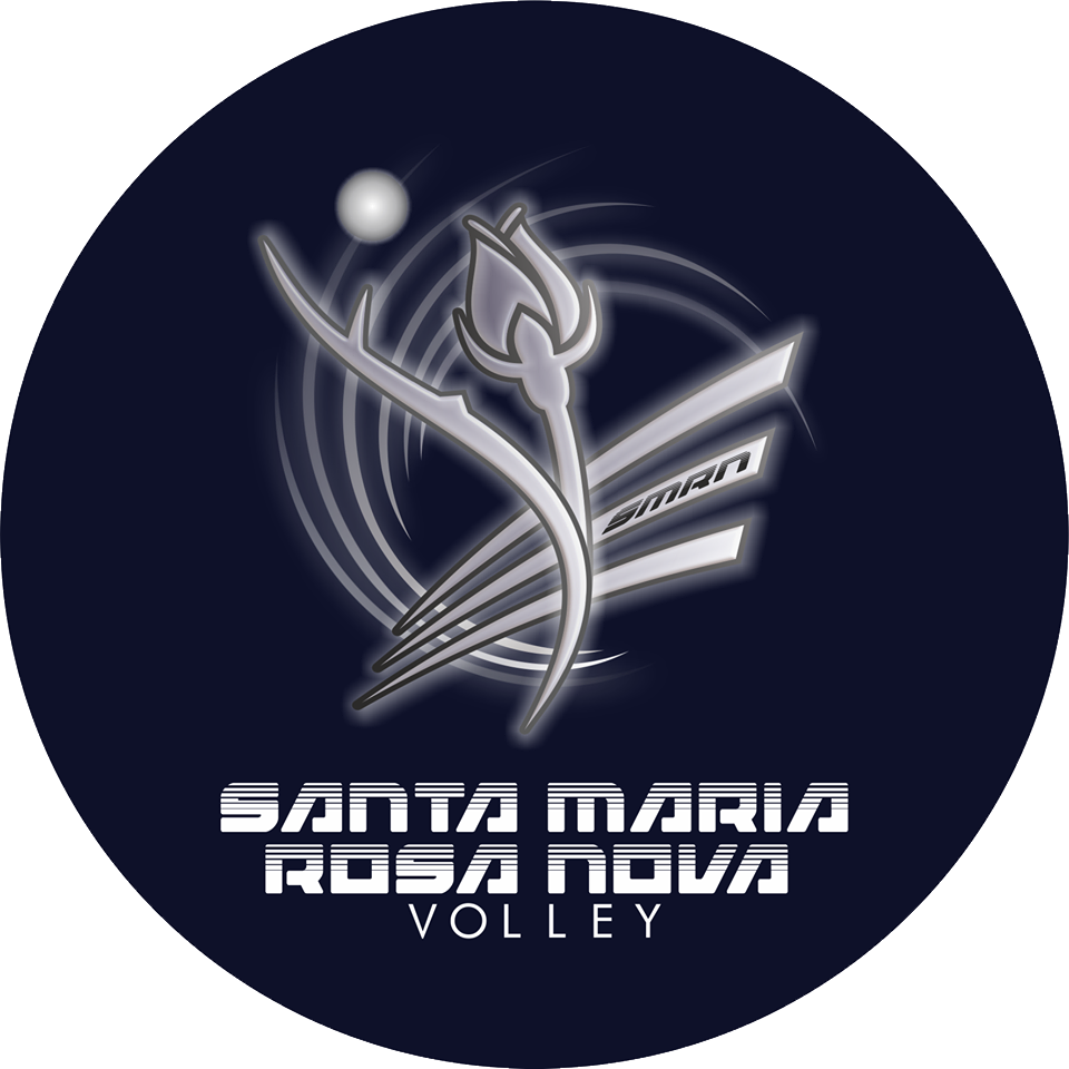 Logo Santa Maria Rosa Nova Volley